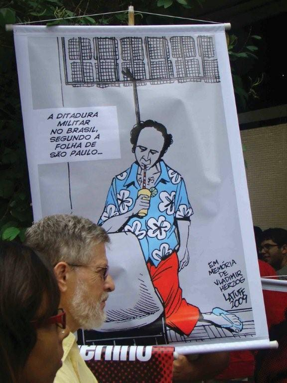 Branda. Pra quem?. Por Camila Souza Ramos e Marília Melhado.